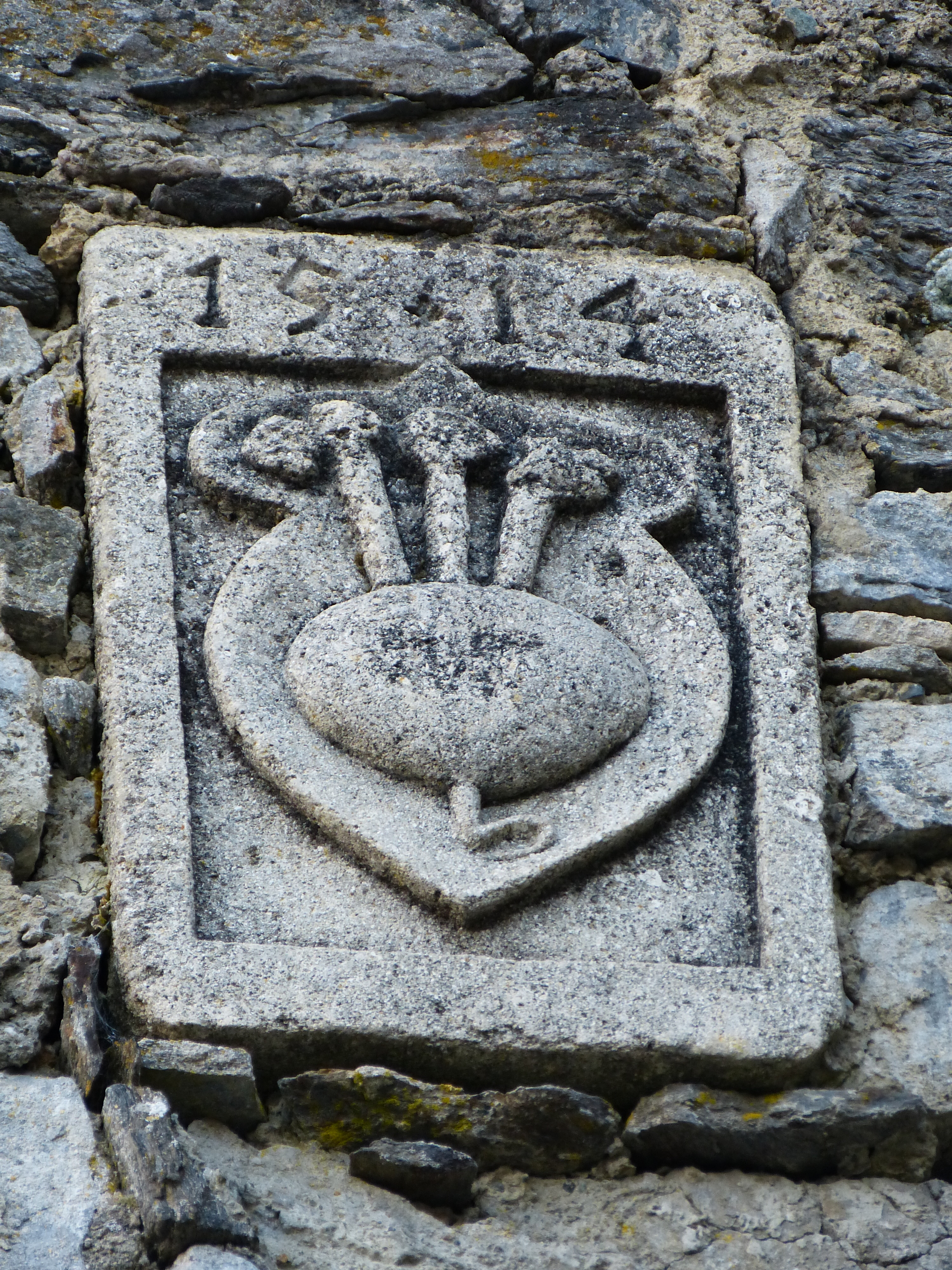 Friesach (Kärnten): Burgruine Petersberg. Detail am äußeren Burgtor unterhalb des "Oberhofs"